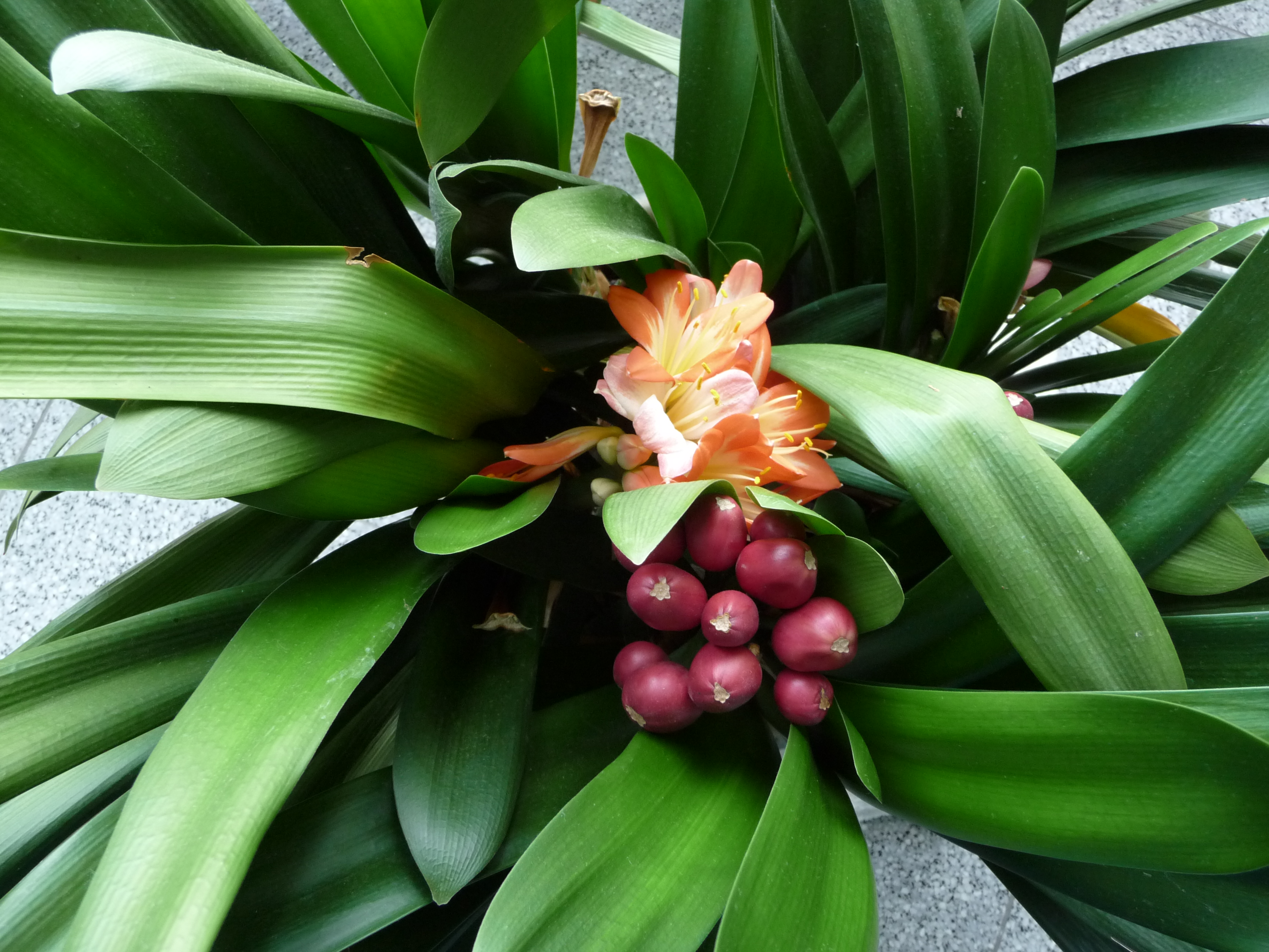 Clivie mit Blüte und Fruchtstand